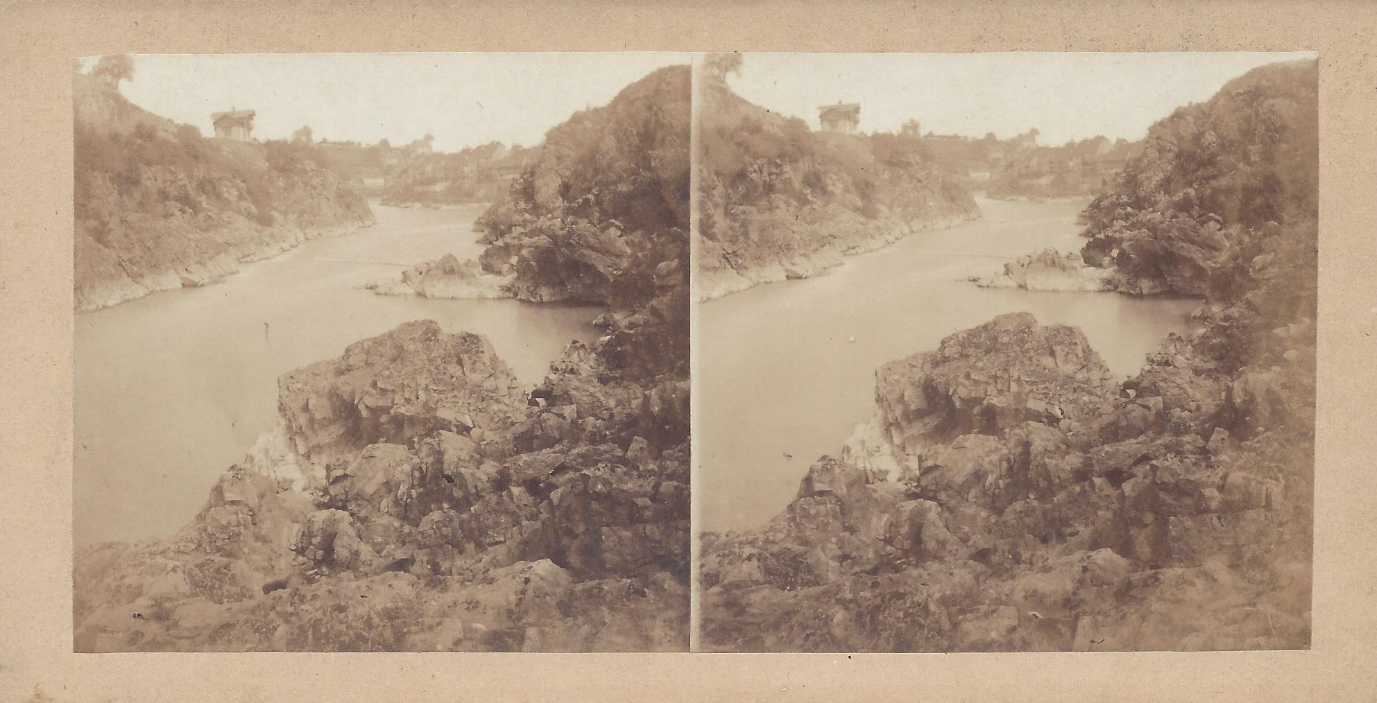 Henri-Charles Plaut:N° 201 Les Bords du Rhin a Laufenburg Canton d'Argovie Suisse